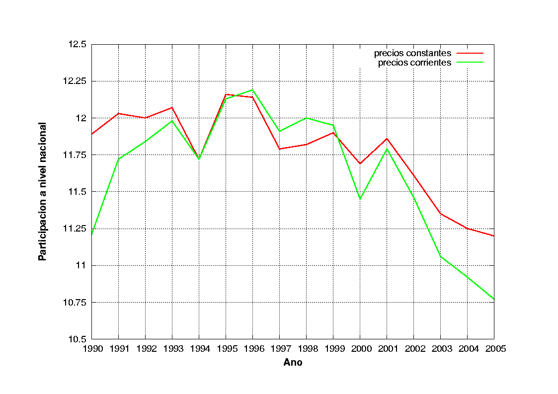 participacion PIB nacional del Valle del Cauca, Colombia